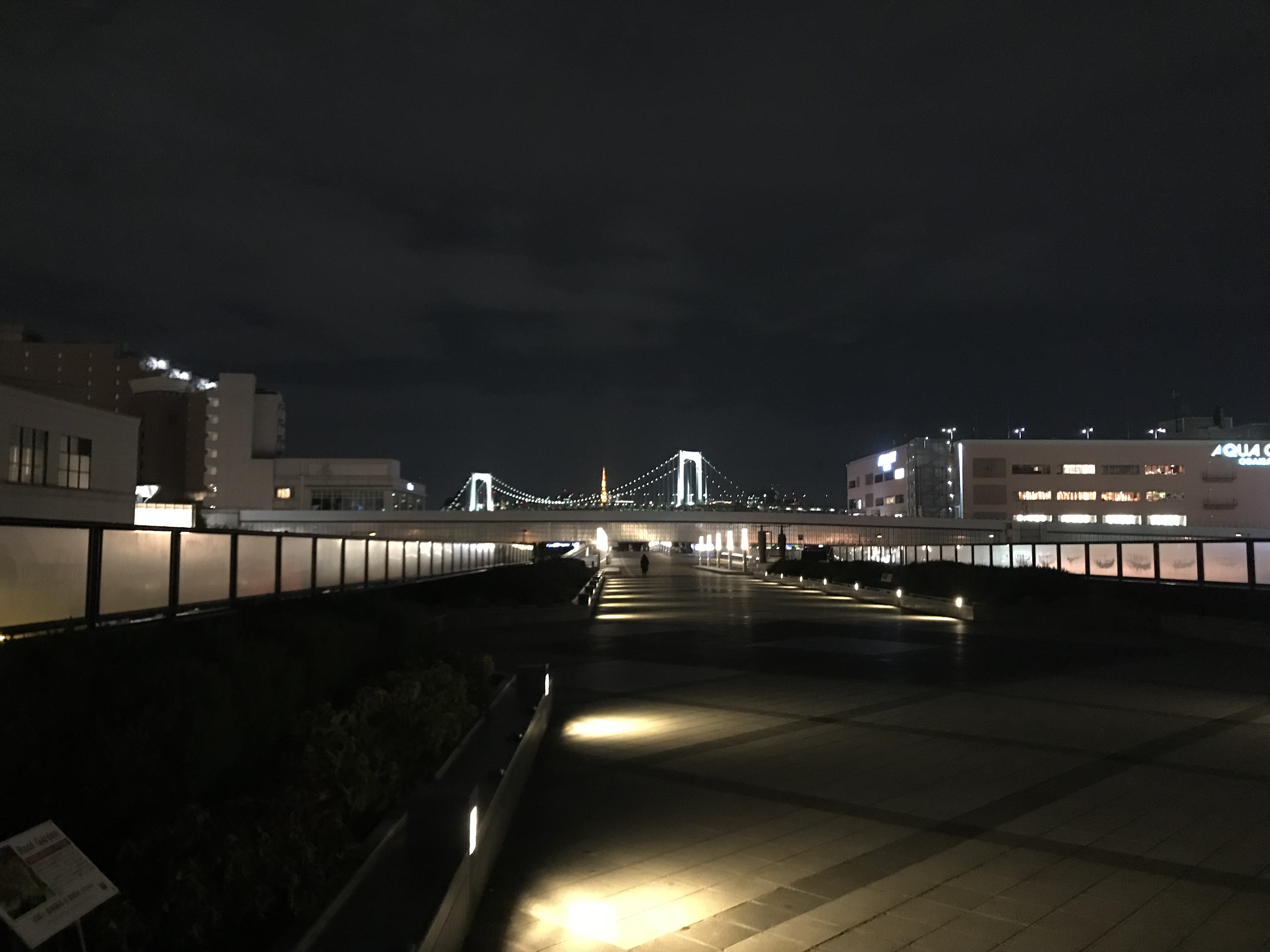 Odaiba ponte